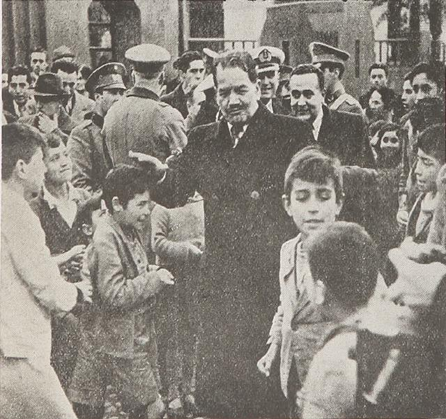 "VISITA DEL PRESIDENTE A TALCA. Su excelencia es objeto de cariñosa acogida por los niños de Talca"